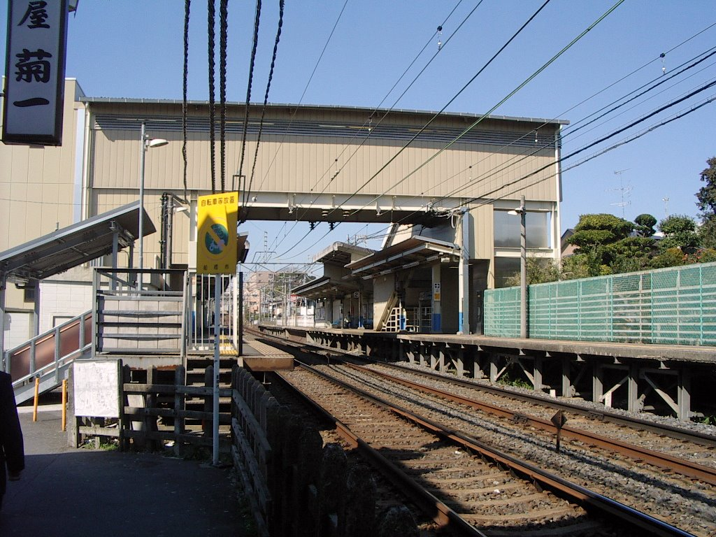 京成電鉄本線京成西船駅